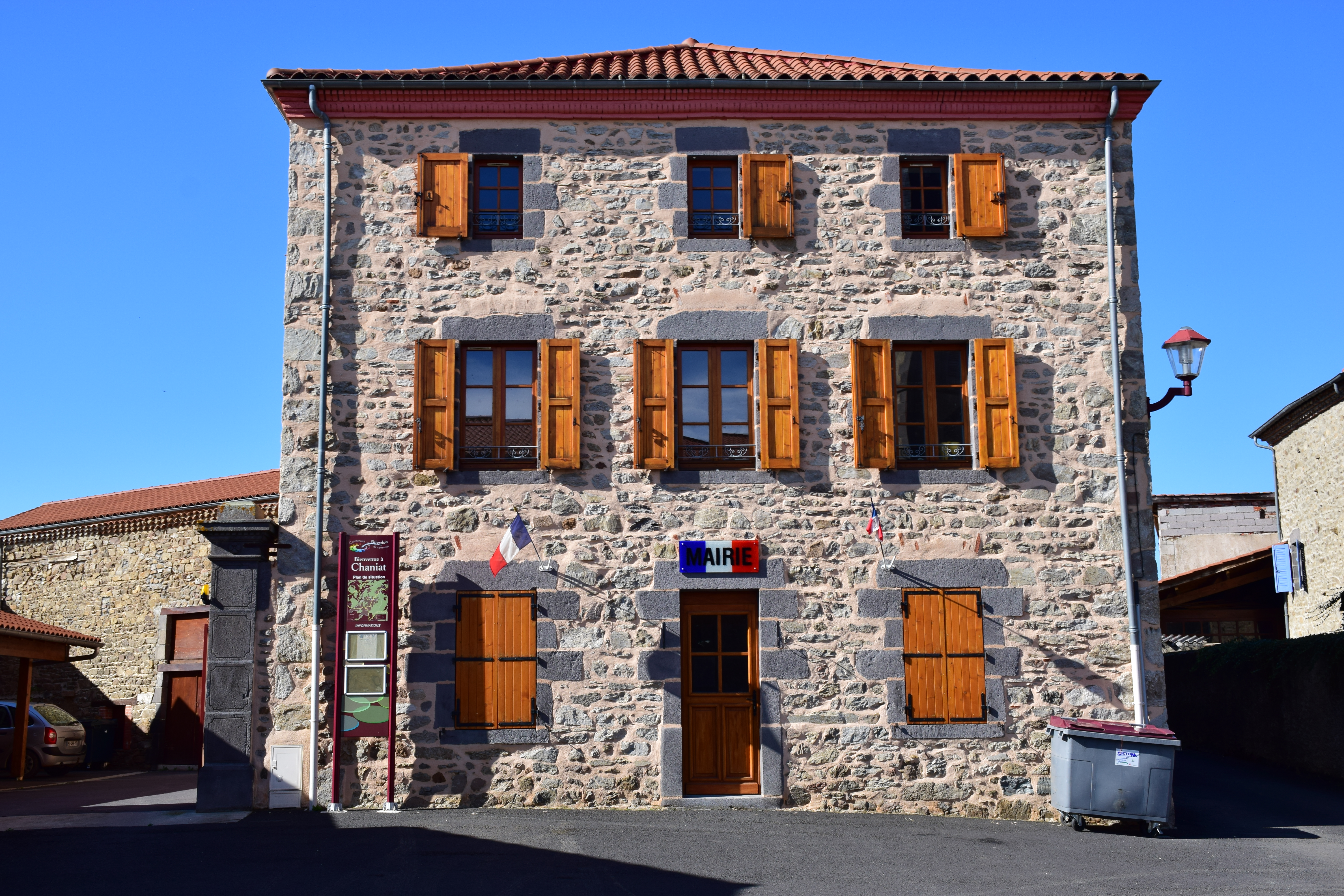 La mairie de Chaniat (Haute-Loire, France).